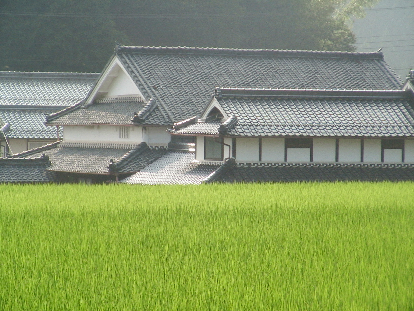 田園風景